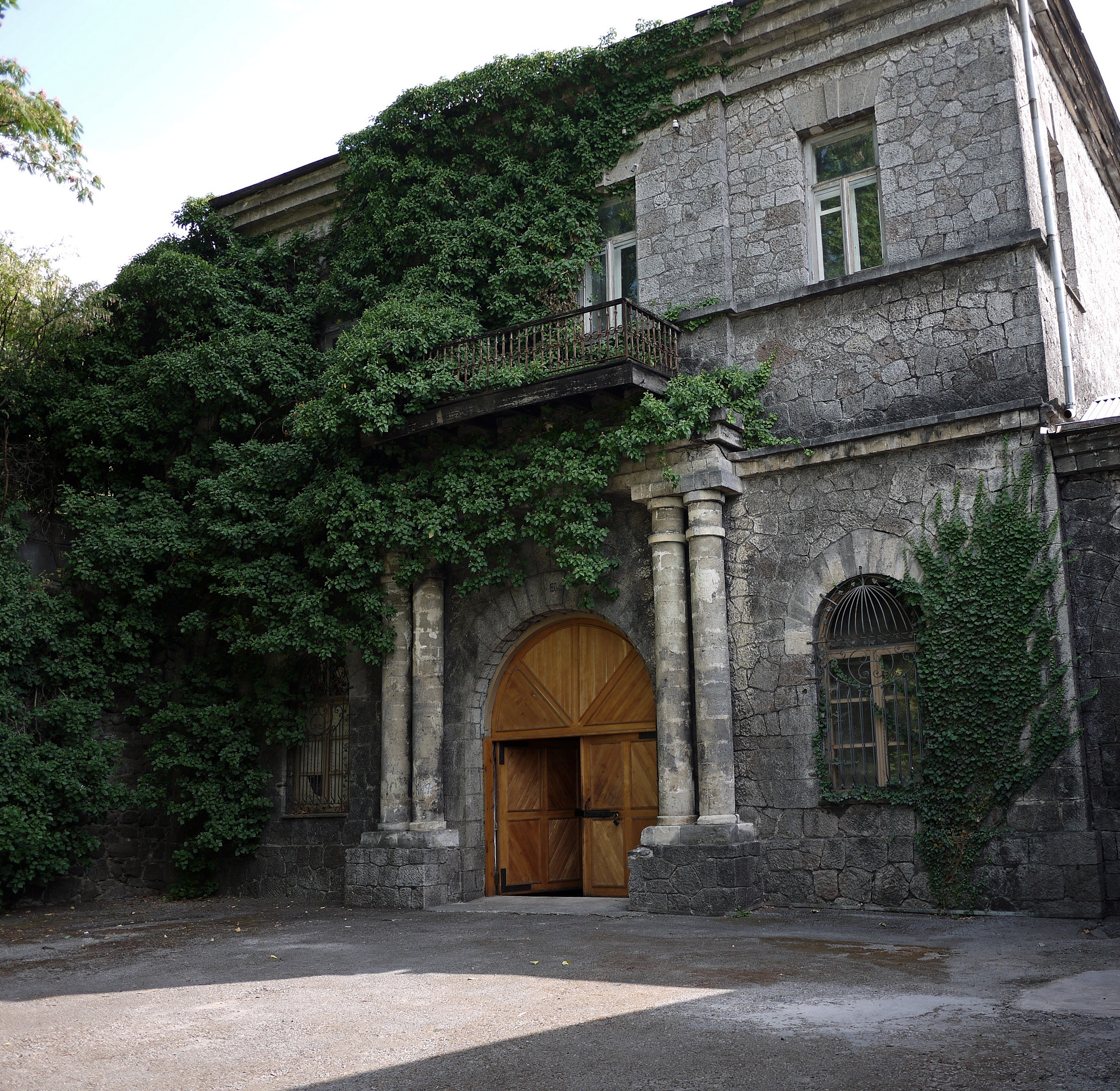 Старинное здание винподвала на территории винодельческого предприятия «Алушта» (ГП «Алушта») входящего в состав ГК НПАО «Массандра»